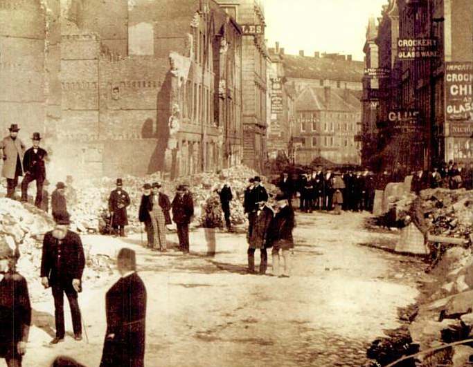 Boston, Massachusetts